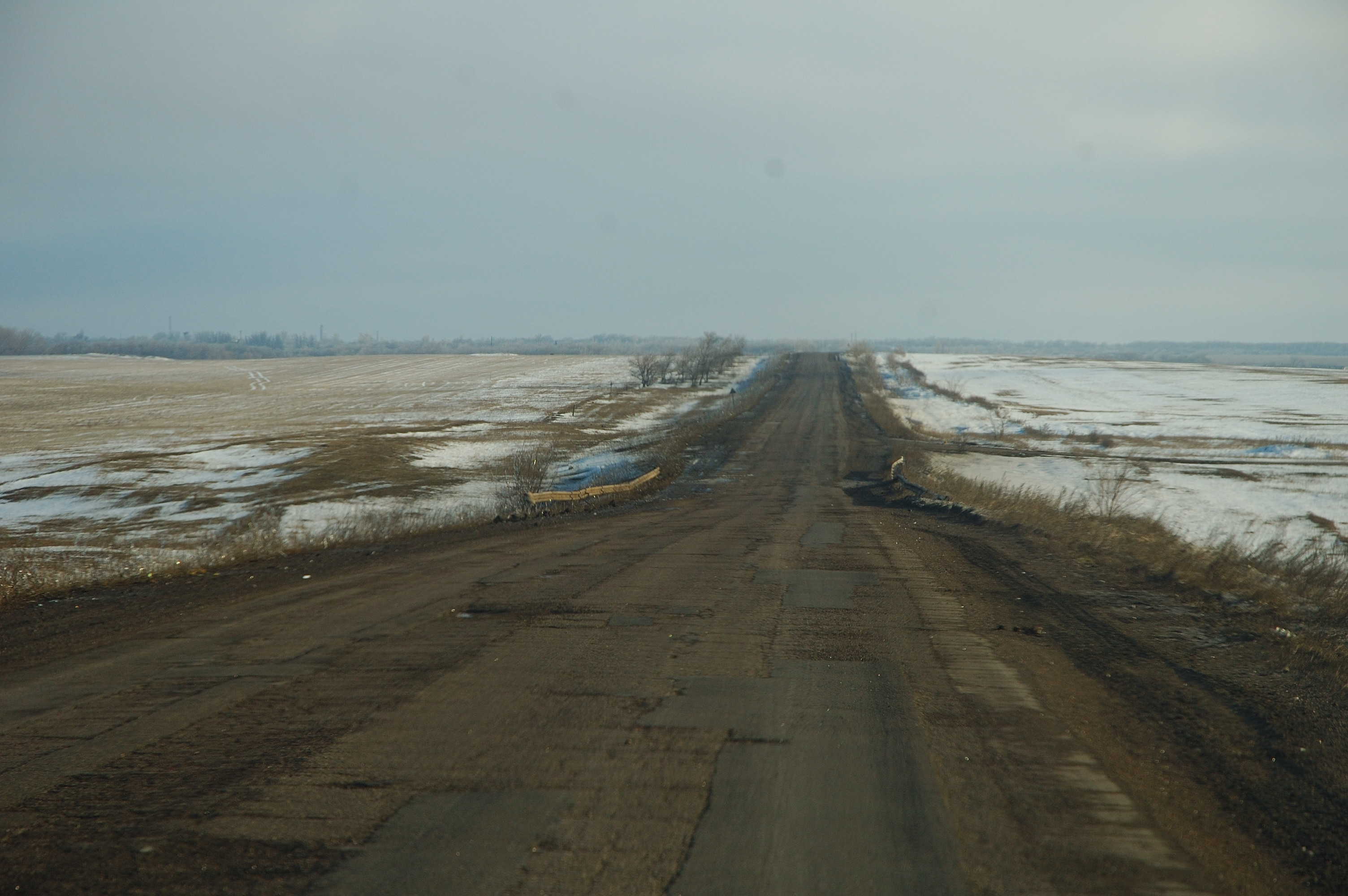 Дорога в ямах та воронках від ракет, з розбитими мостами і порожня без транспорту.